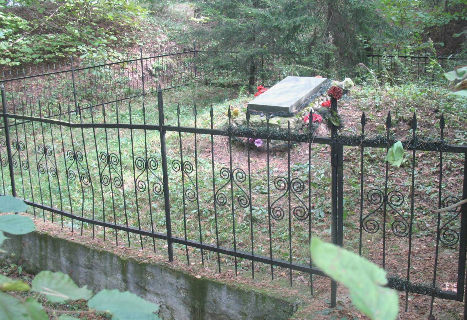 Памятник убитым нацистами евреям Логойска. Установлен на братской могиле убитых в 1950-е годы.